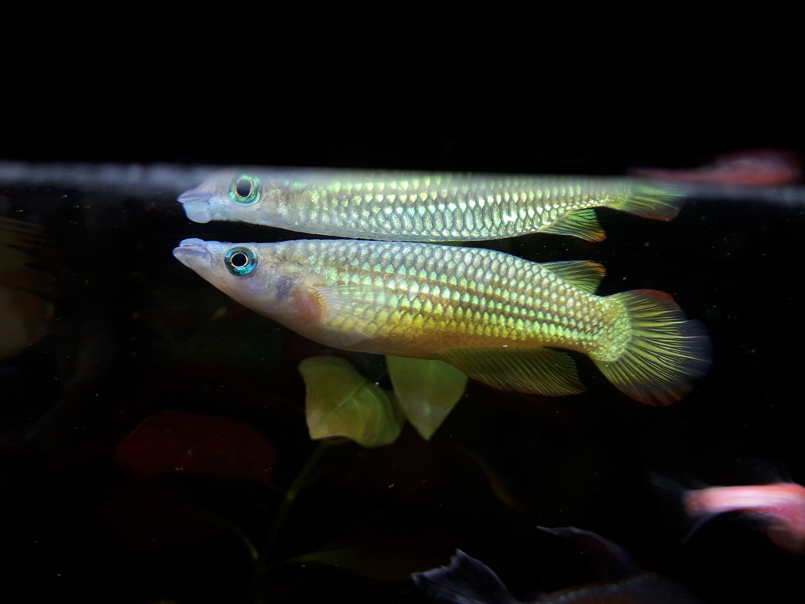 male Striped Golden Panchax